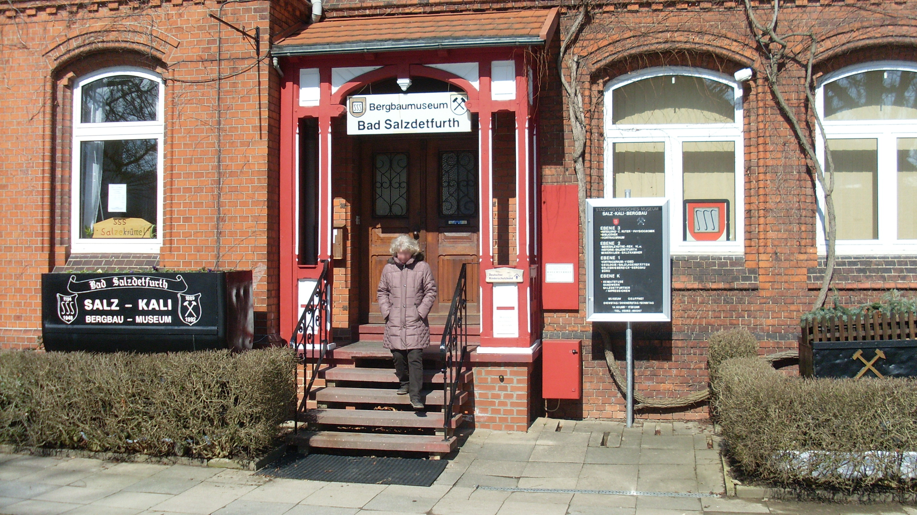 Eingang des Salz- und Kali-Bergbaumuseums